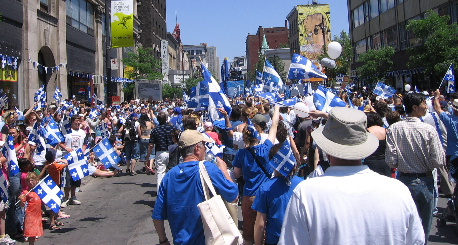 Fête nationale du Québec celebrations in Montreal, June 24, 2006.